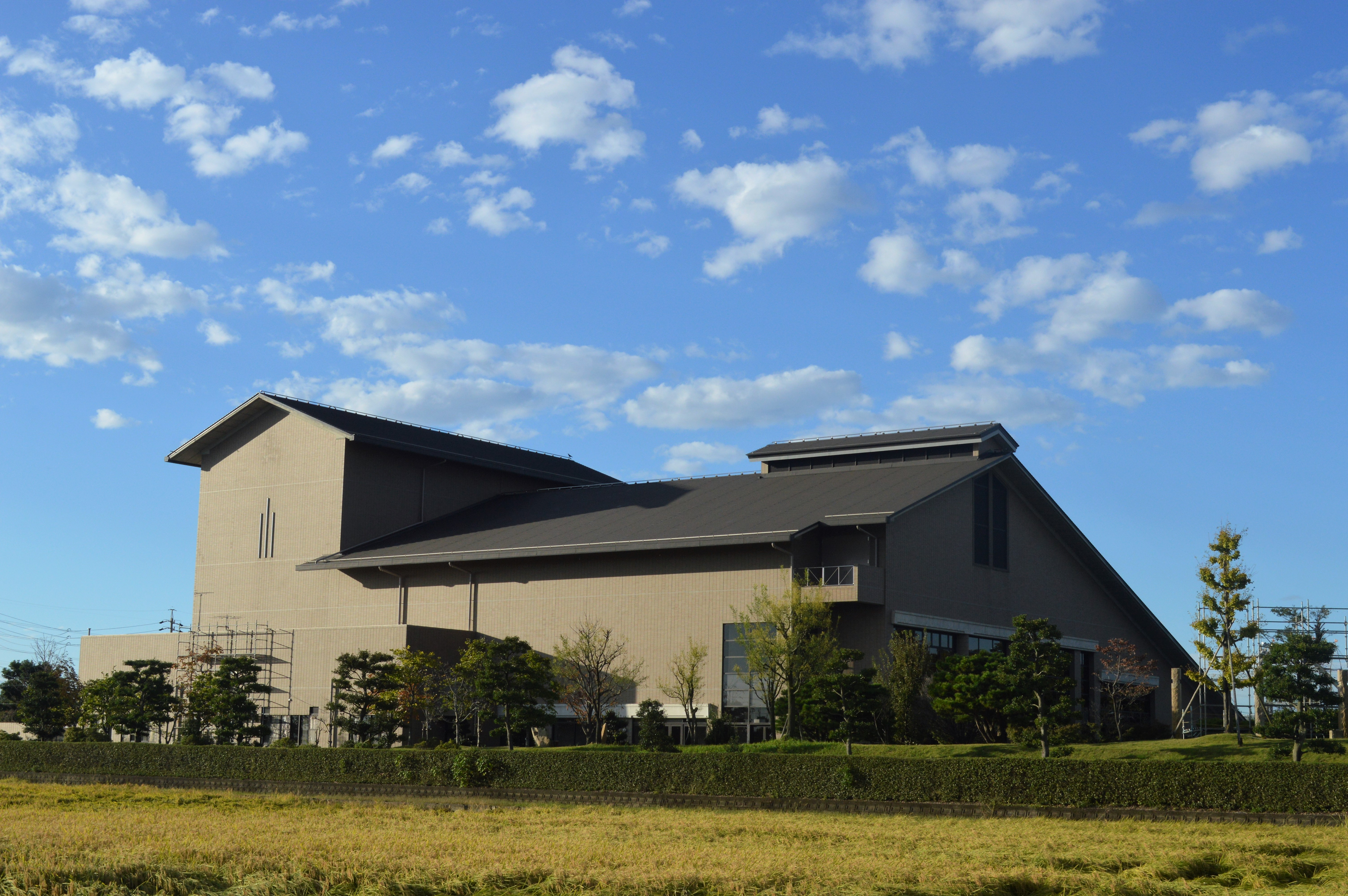 愛知県あま市のあま市美和文化会館。あま市美和図書館などが入っている。